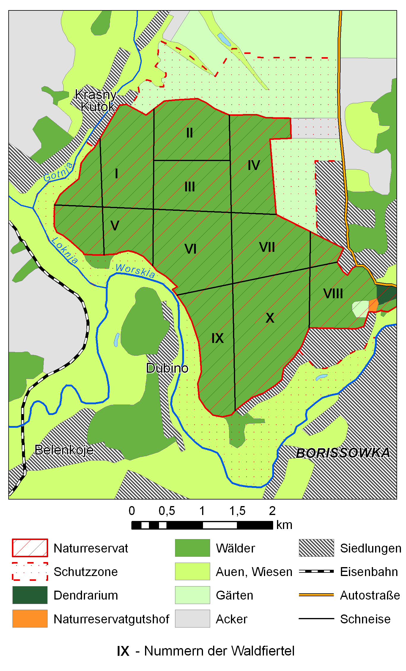 Карта Леса на Ворскле и окрестностей